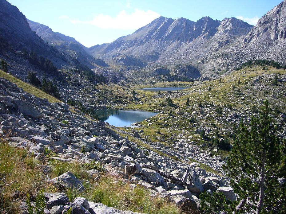 Estanyets de Dellui; la Vall de Boí, Alta Ribagorça, Catalunya